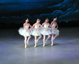 Quatre ballarines ballant el famós allegro de la dansa dels cignes